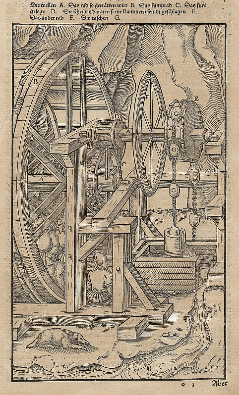 Original image description from the Deutsche Fotothek Bergwerk & Bergbau & Tretrad & Entwässerung & Taschen